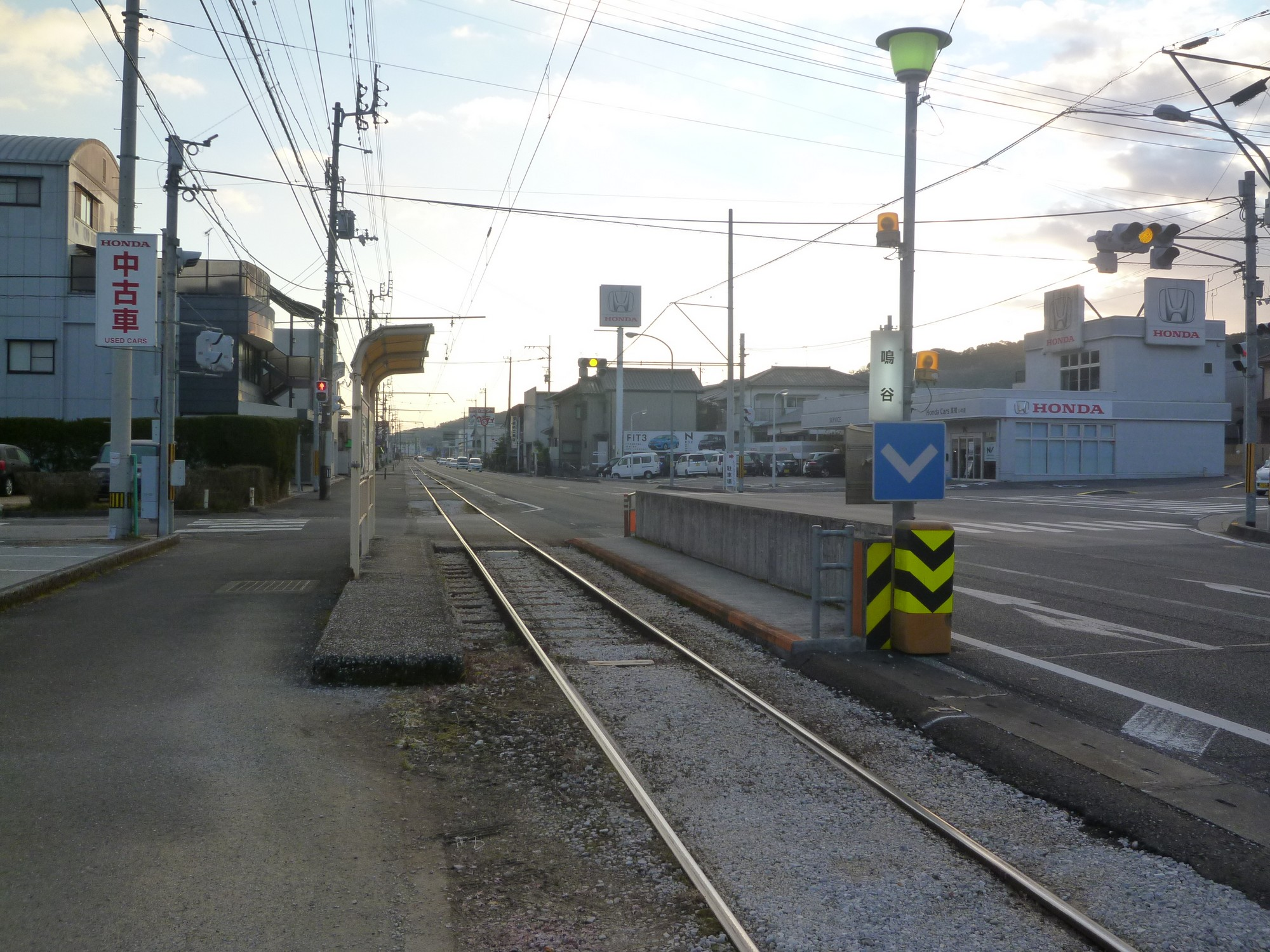 2015年1月2日撮影。